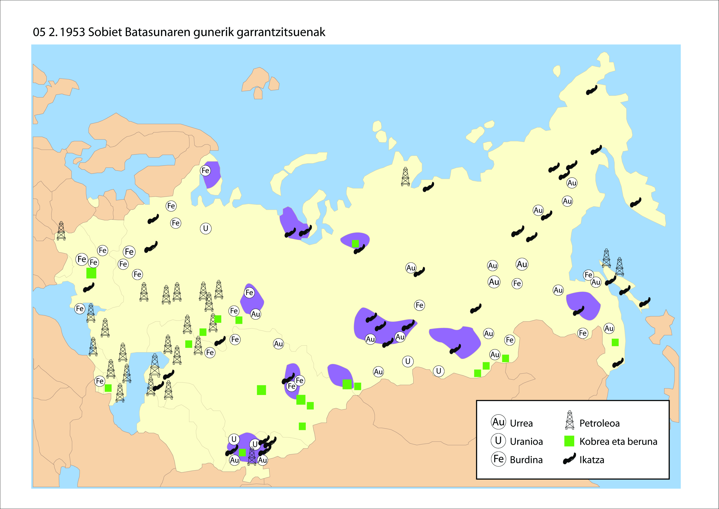 1953 Sobiet Batasunaren gune ekonomiko garrantzitsuenak, UEUren liburutik hartua.